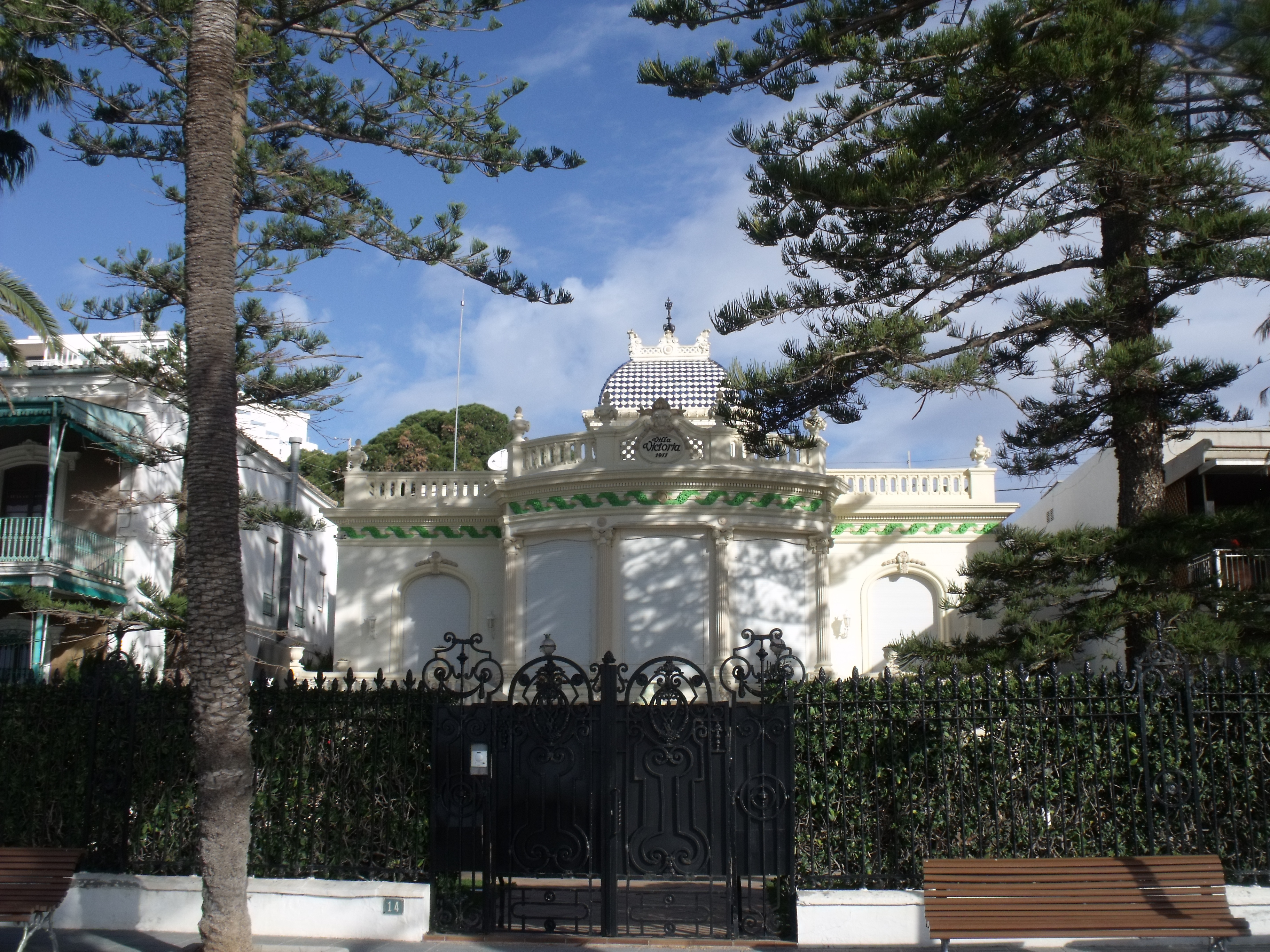 Villa Victoria, 1911. Zona litoral en la que, a finales del siglo XIX, comenzaron a alzarse numerosas casas de veraneo.